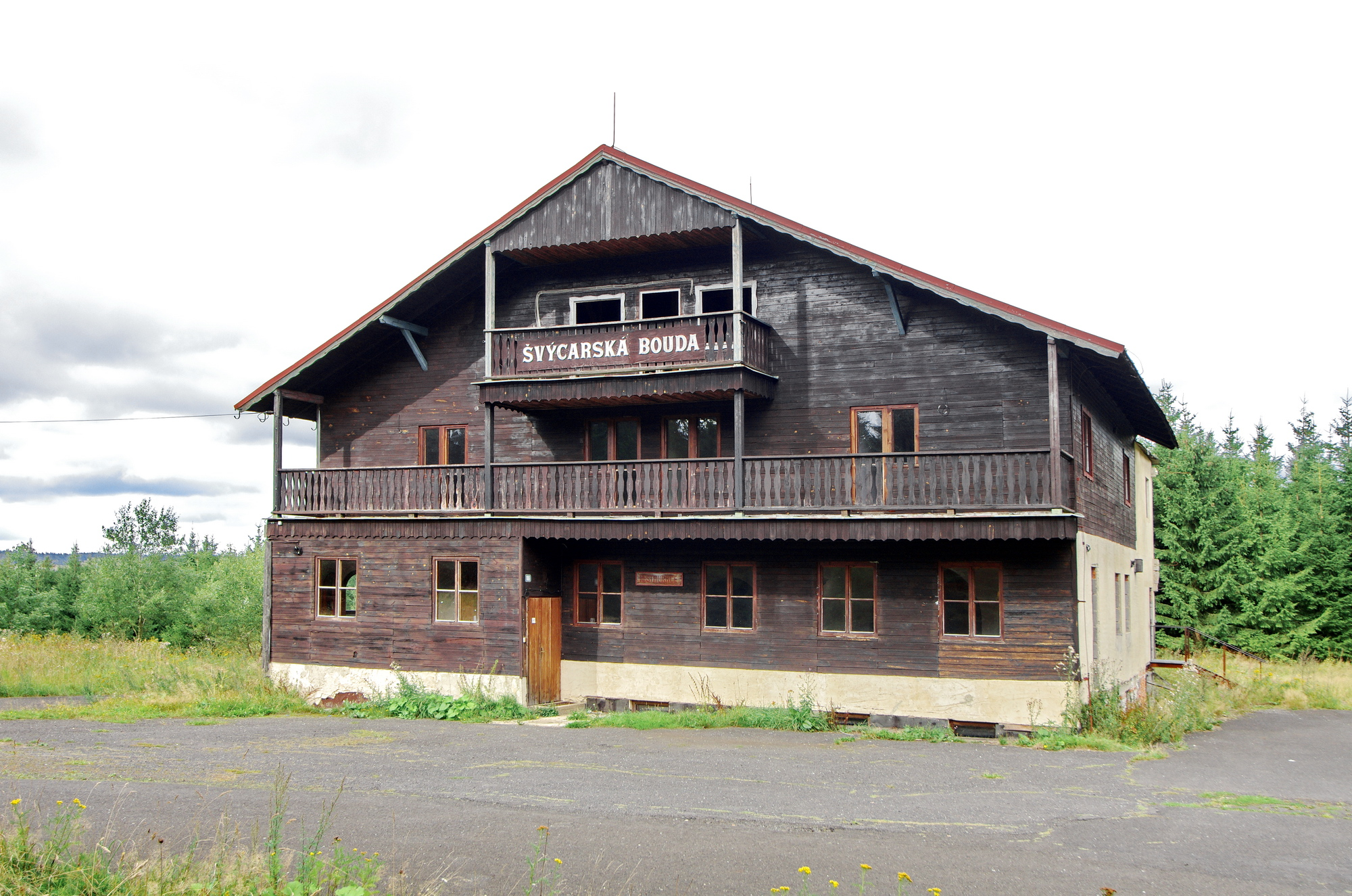 Chata Švýcárna pod Plešivcem, Krušné hory, okres Karlovy Vary